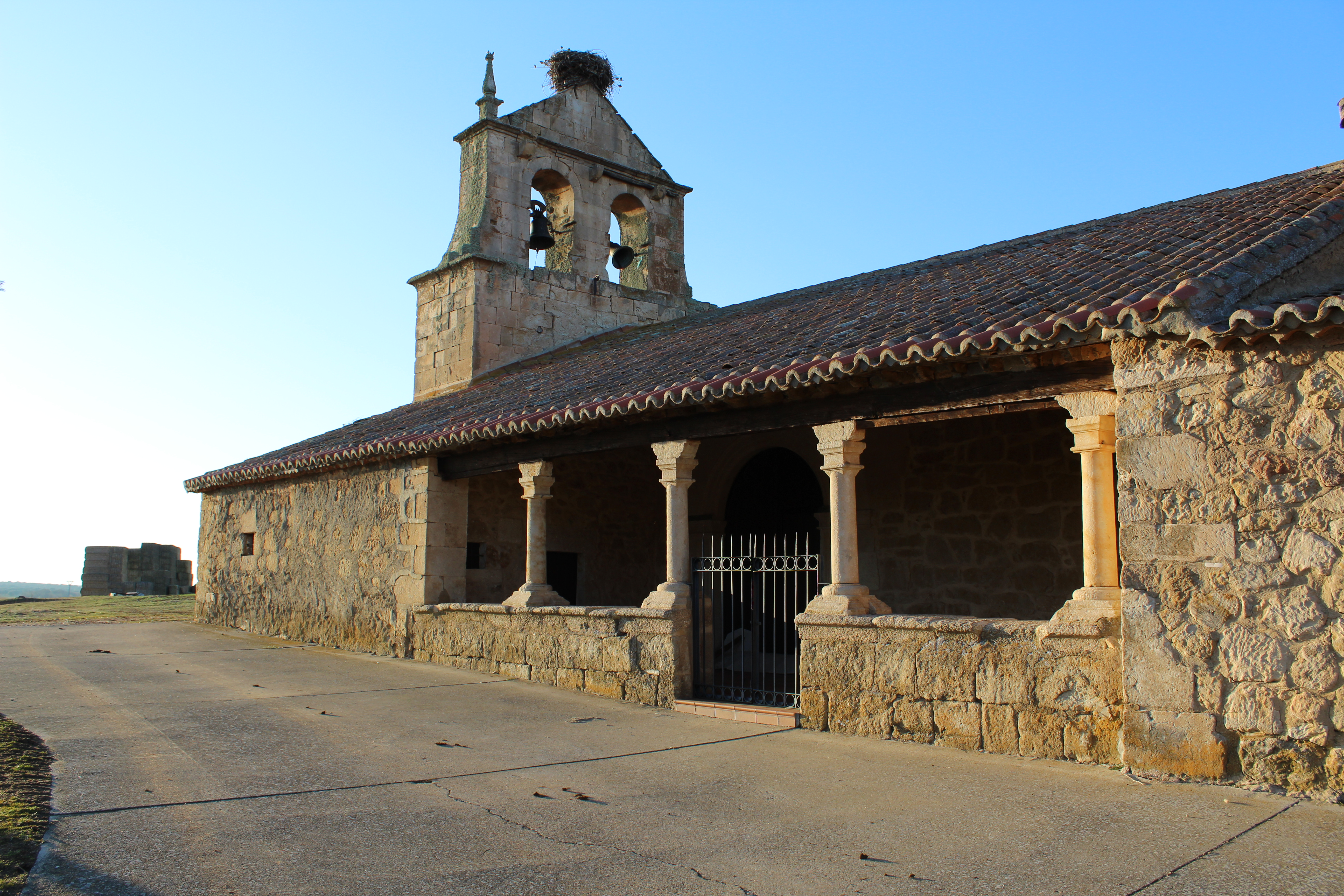 Entrada principal de la Iglesia de Canillas de Abajo, es la Iglesia de San Vicente Mártir.